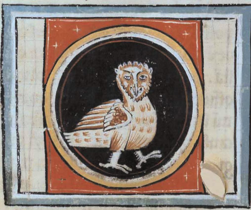 de avibus miniatura